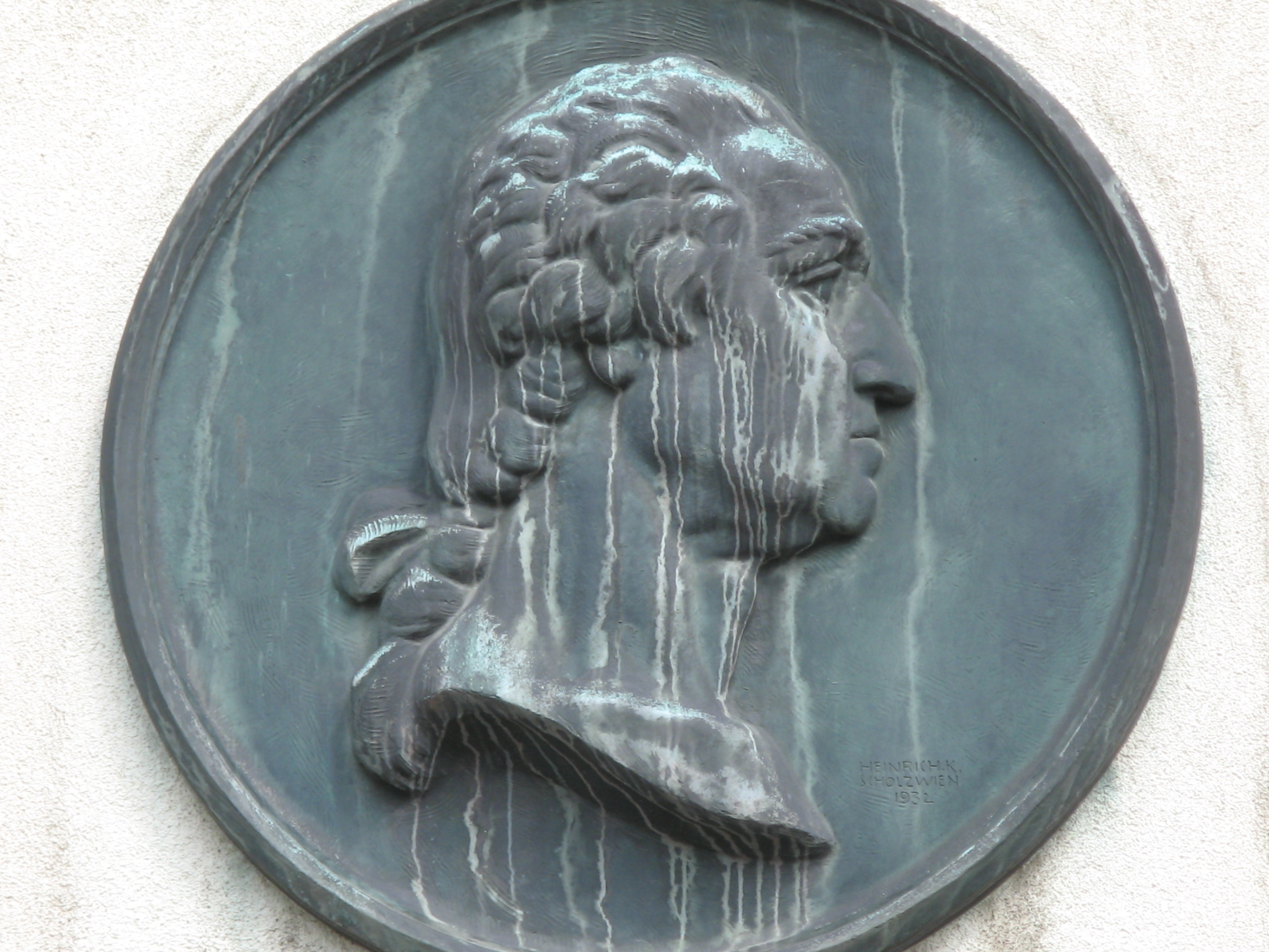 Reliefmedaillon George Washington (1932) von Heinrich K. Scholz, George Washington-Hof, Wien-Favoriten